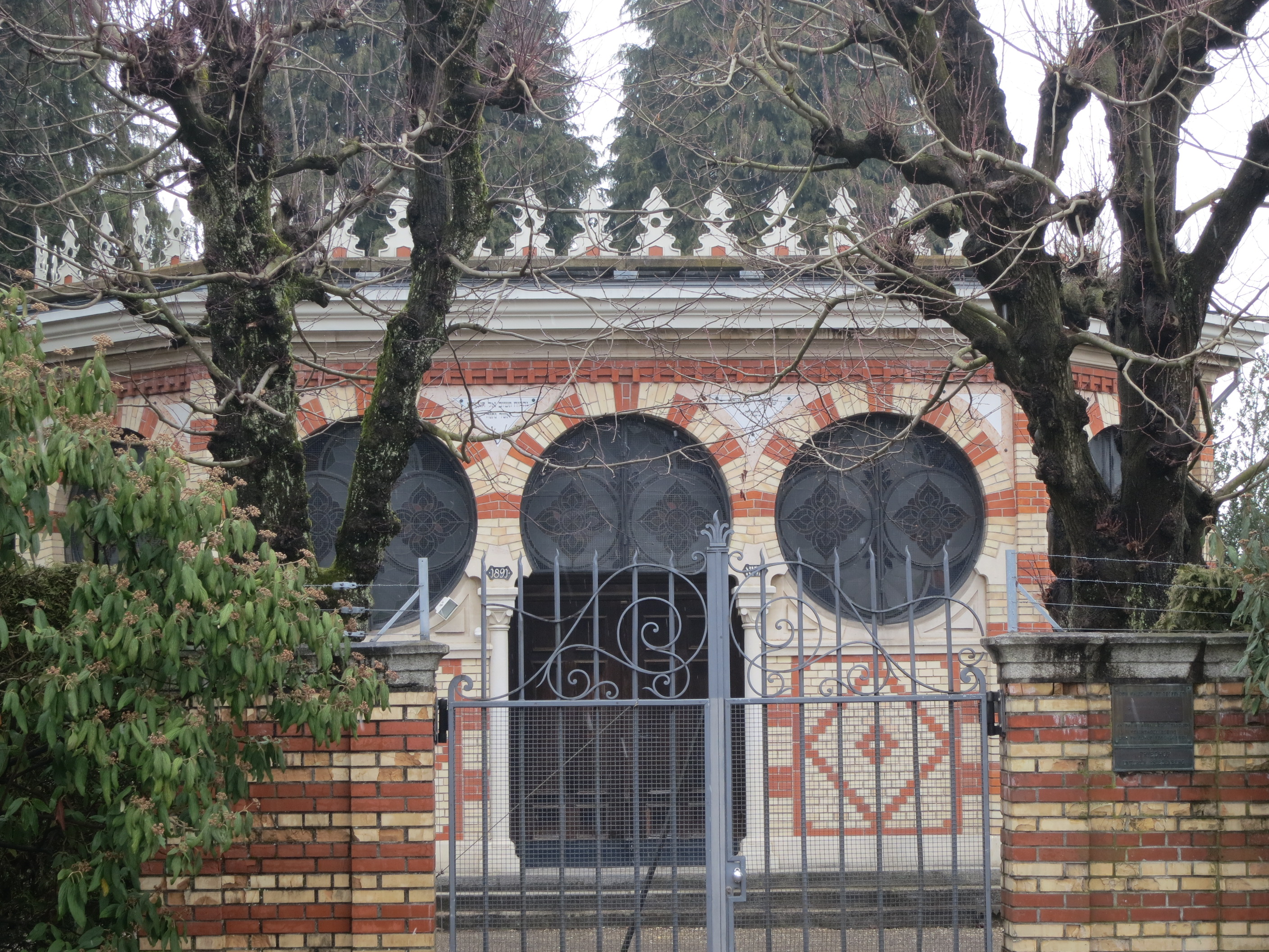 Abdankungshalle Israelitischer Friedhof Unterer Friesenberg, Zürich-Wiedikon, Schweiz